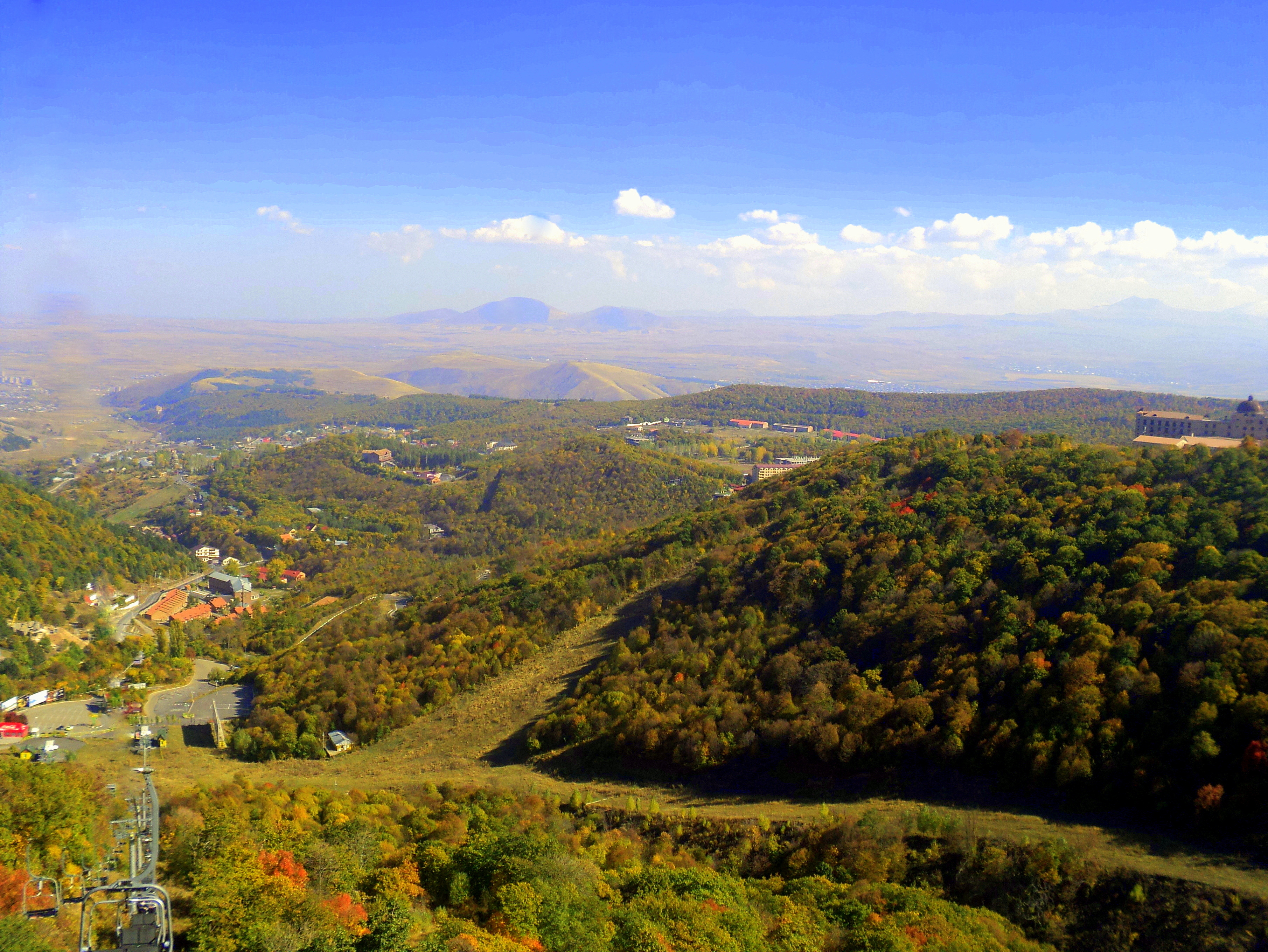 Արզականի և Մեղրաձորի արգելավայր